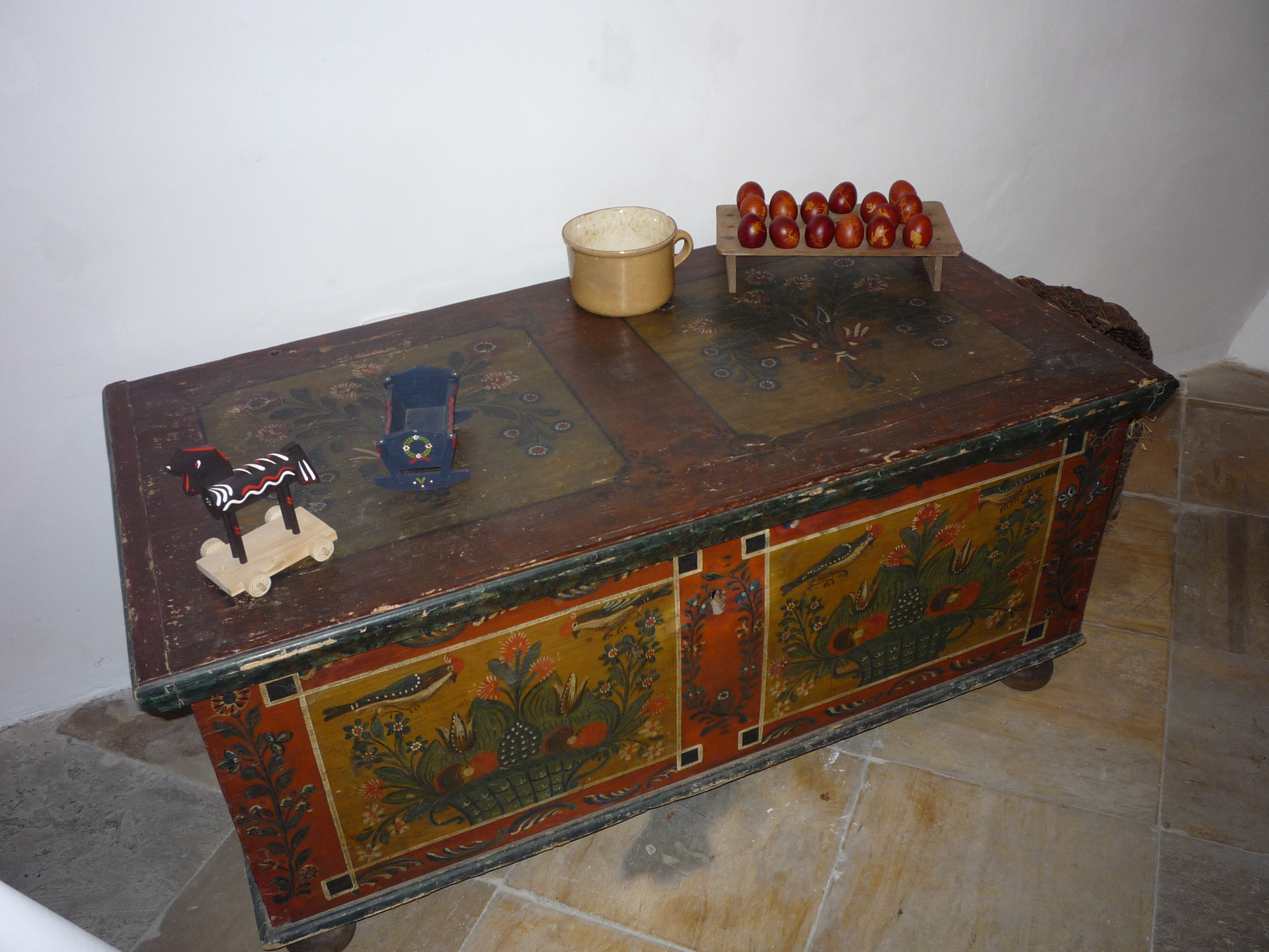 Autor fotografie Jiří Zelenka. Velikonoce na Vysočině. 18. - 19.století. V domě Karla Havlíčka Borovského.